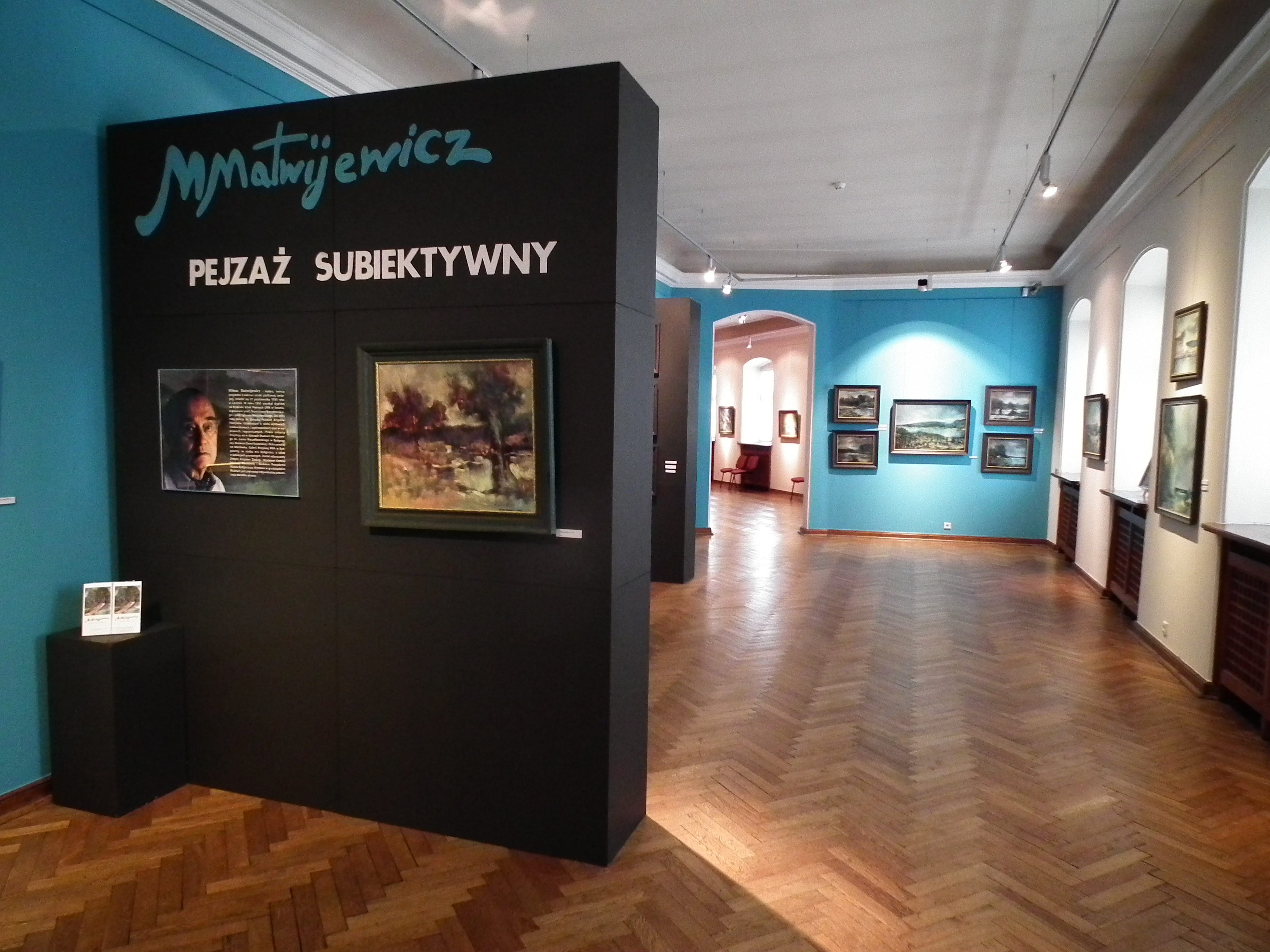 Wystawa Miłosza Matwijewicza "Pejzaż subiektywny" w Muzeum w Grudziądzu - 2018r.